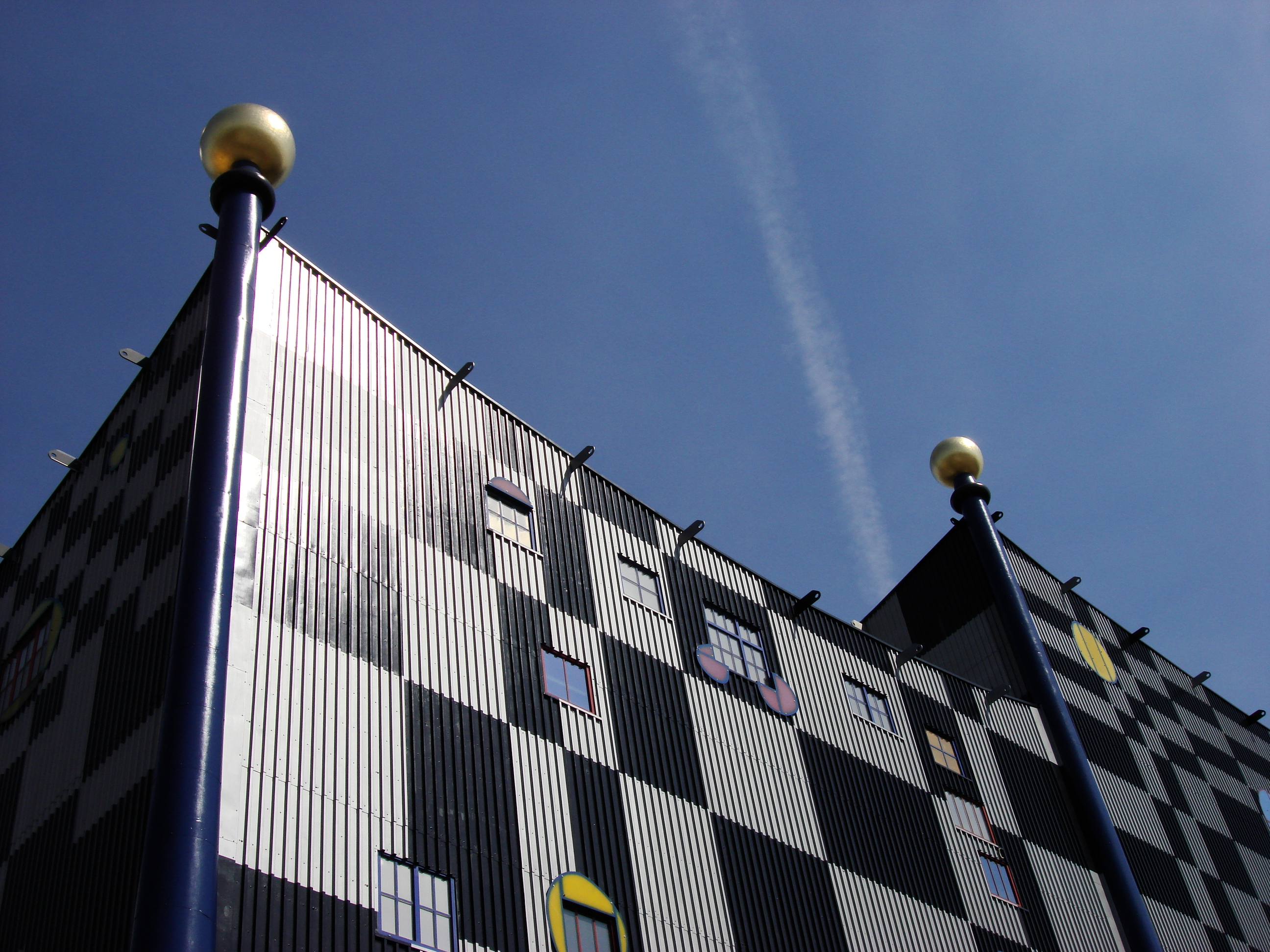 Fernwärme in Wien